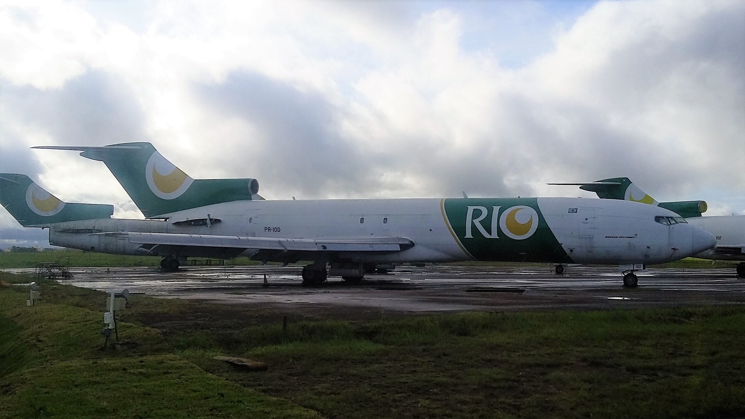 Avião Boing B727 da RIO PR-IOD SJP no Aeroporto Internacional de São José dos Pinhais-PR